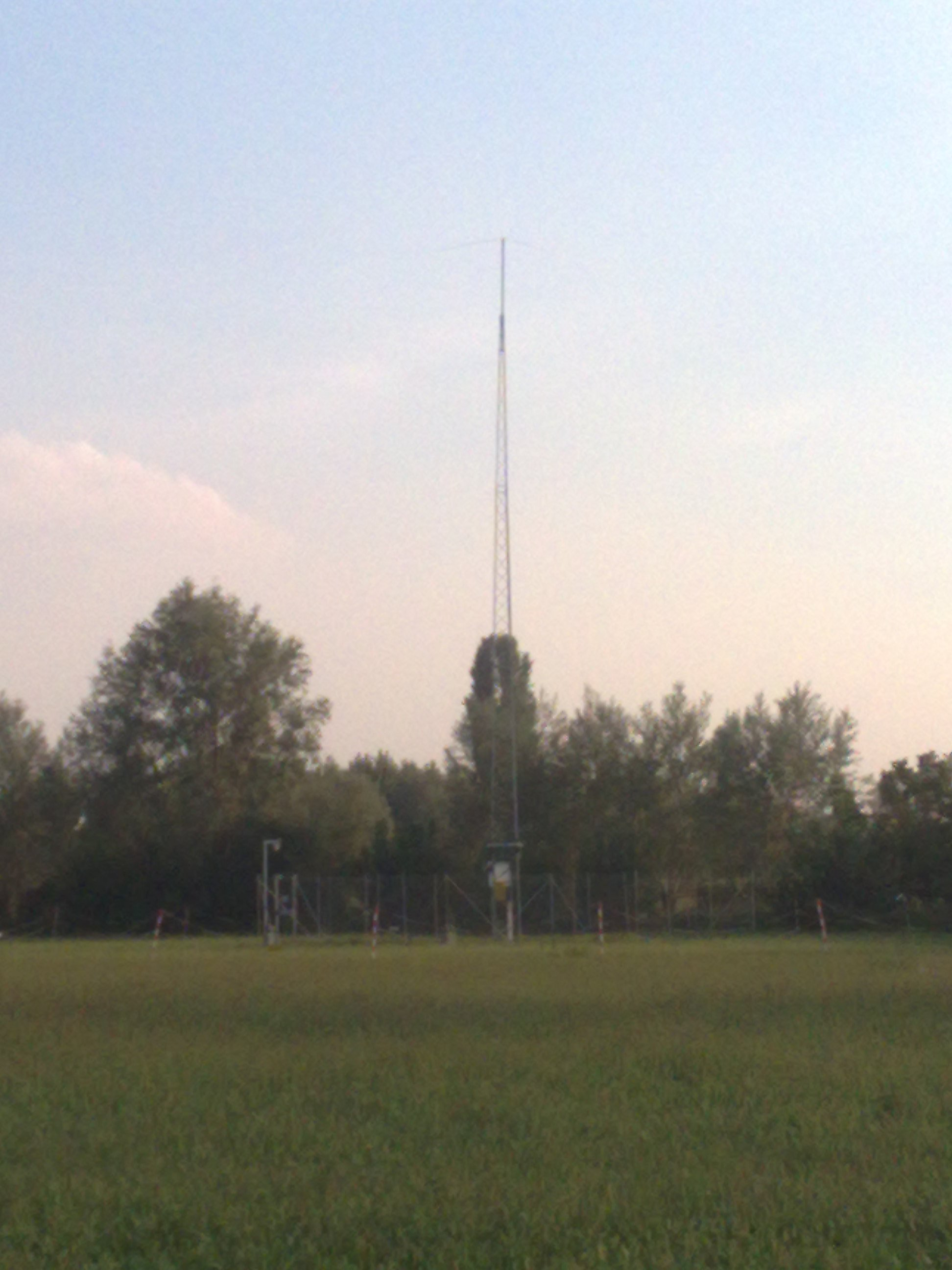 Antenna NDB Vicenza